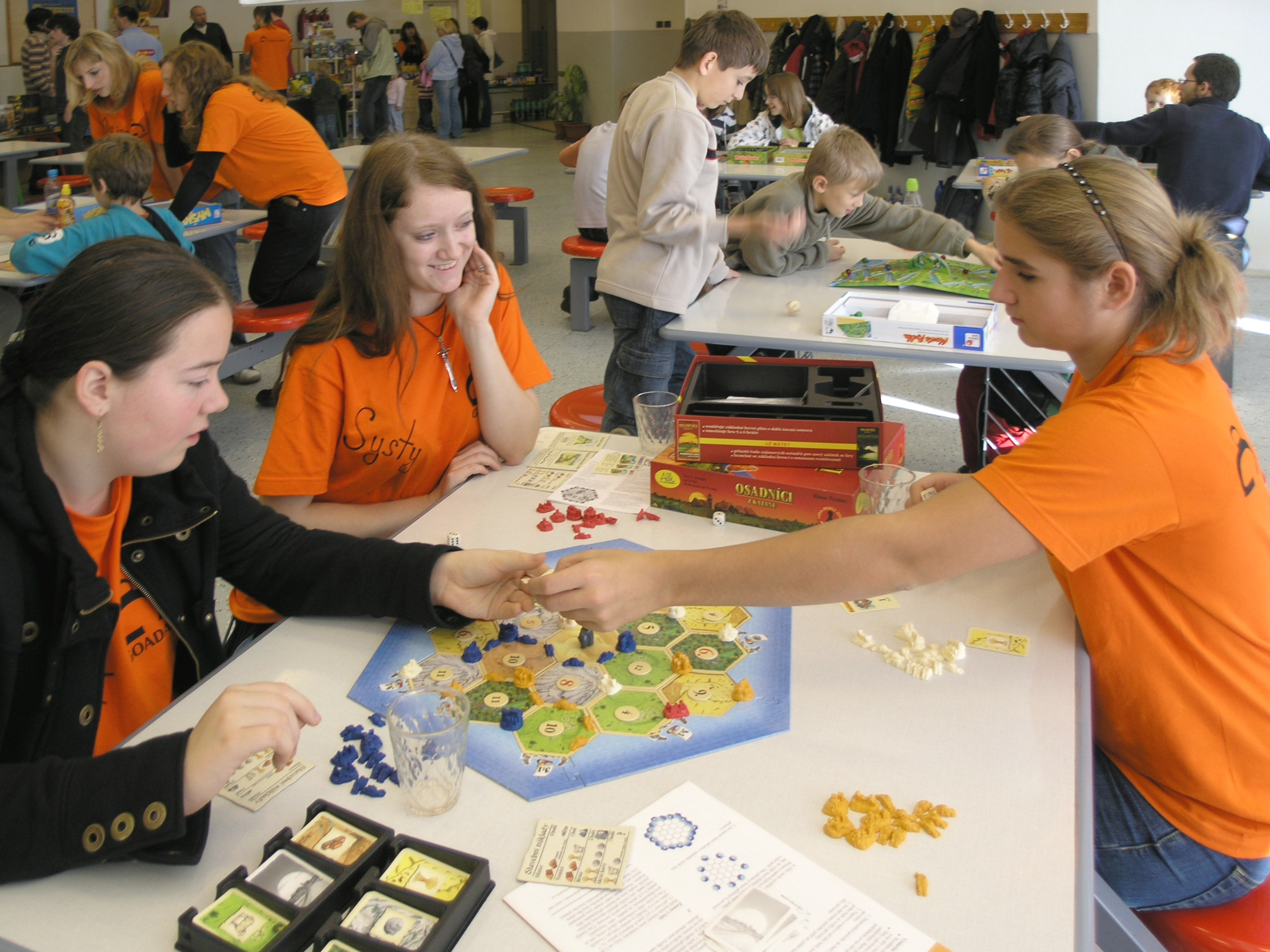 Goliáš a David 2008